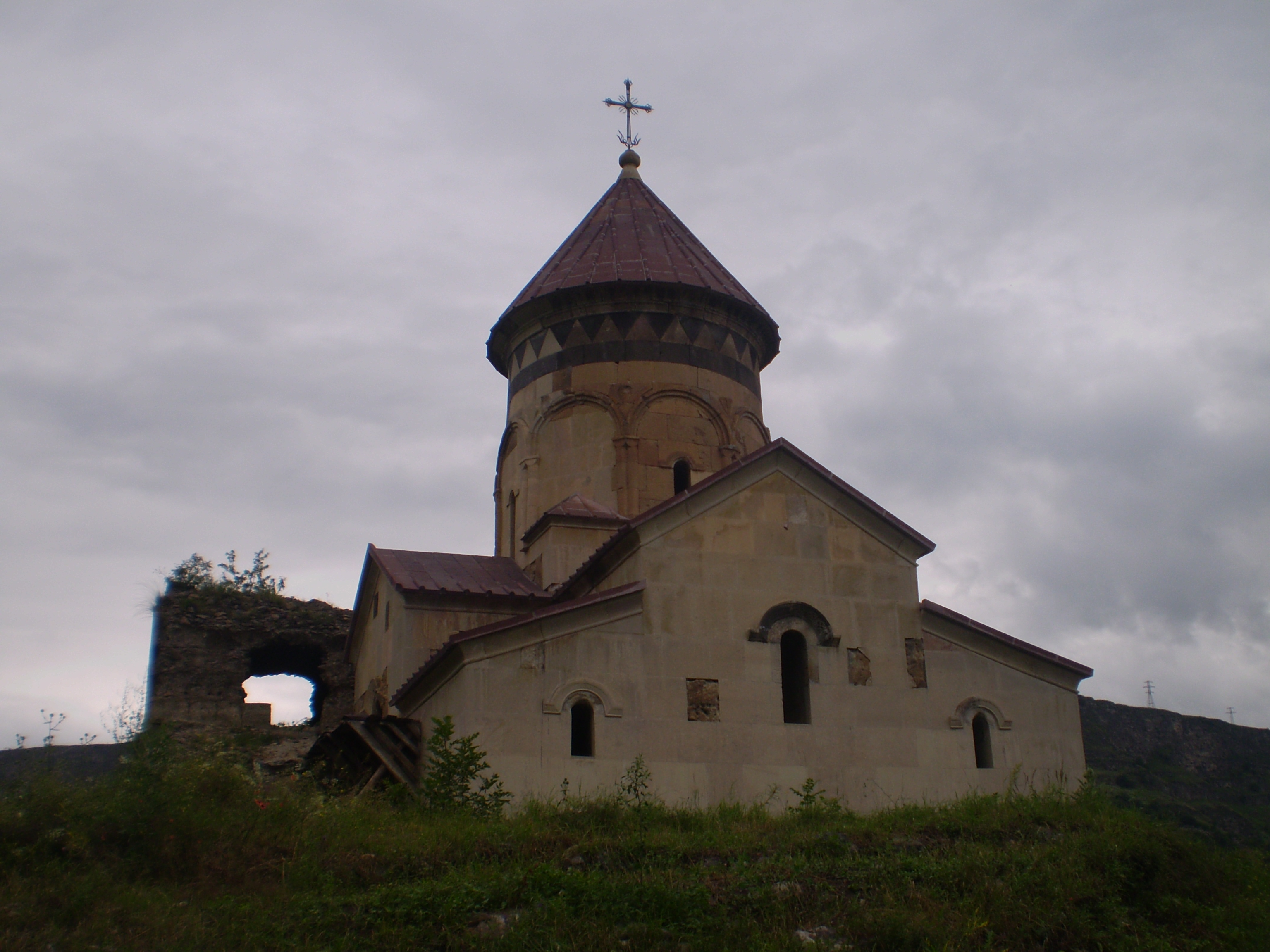 Hnevank monastery.